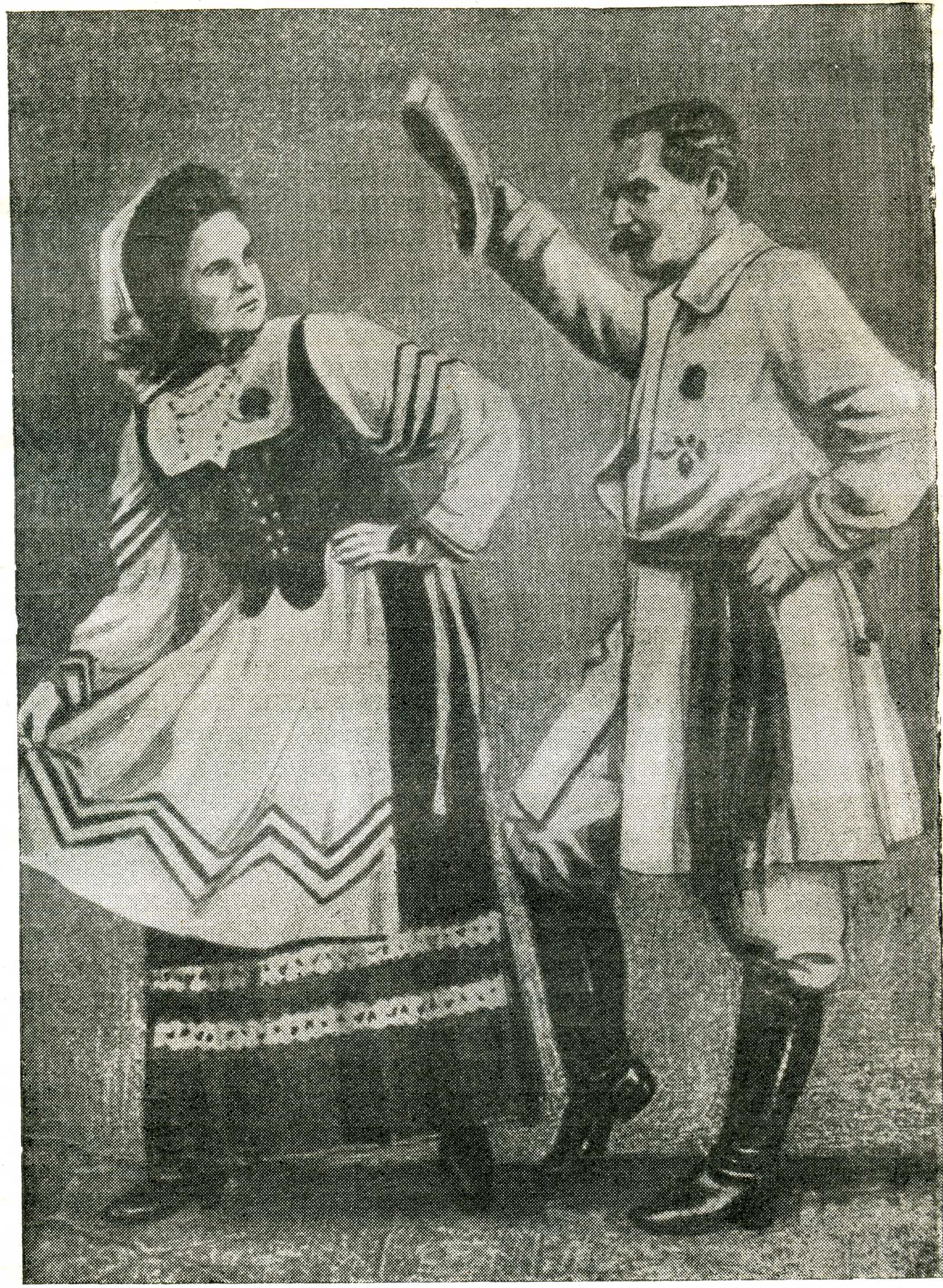 Беларуская (тарашкевіца): Беларускі актор і рэжысэр Ігнат Буйніцкі з дачкой у часе танца